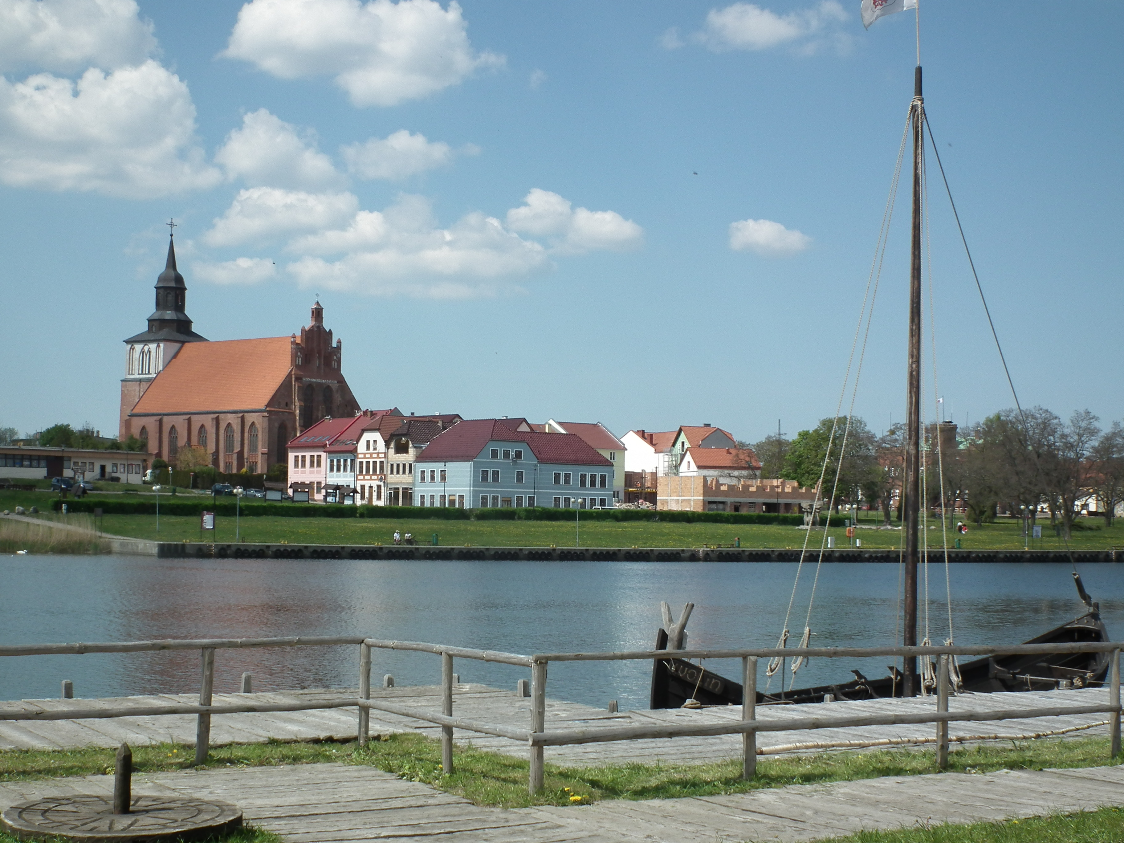 Kolegiata w wolinie i nowe Stare Miasto widziane z Centrum Słowian i Wikingów w Wolinie.